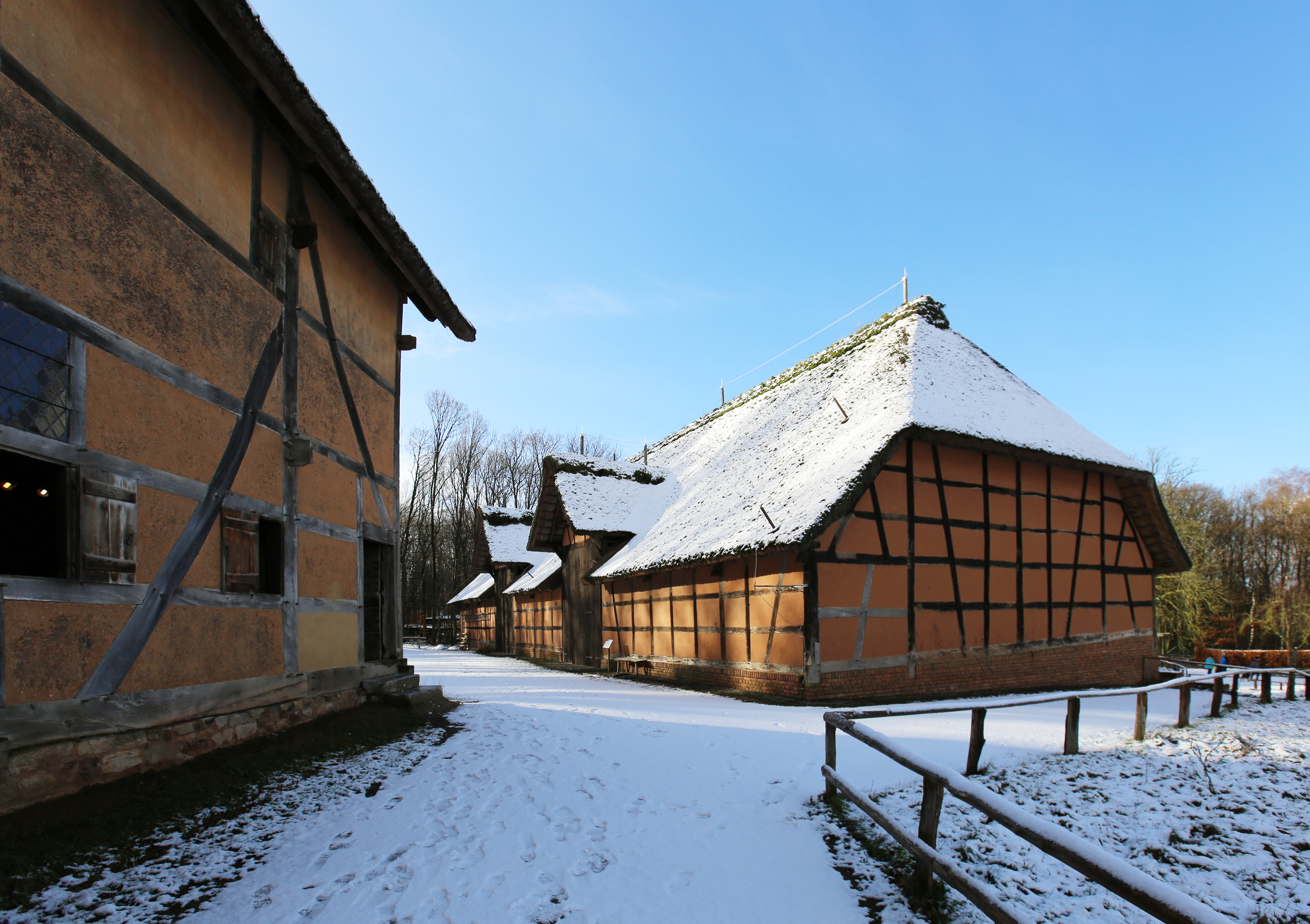 Ehemalige Dietkirchener Zehntscheune aus Sechtem im LVR-Freilichtmuseum Kommern